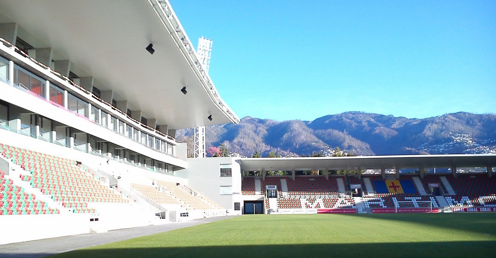 Bancada Central do Estádio dos Barreiros